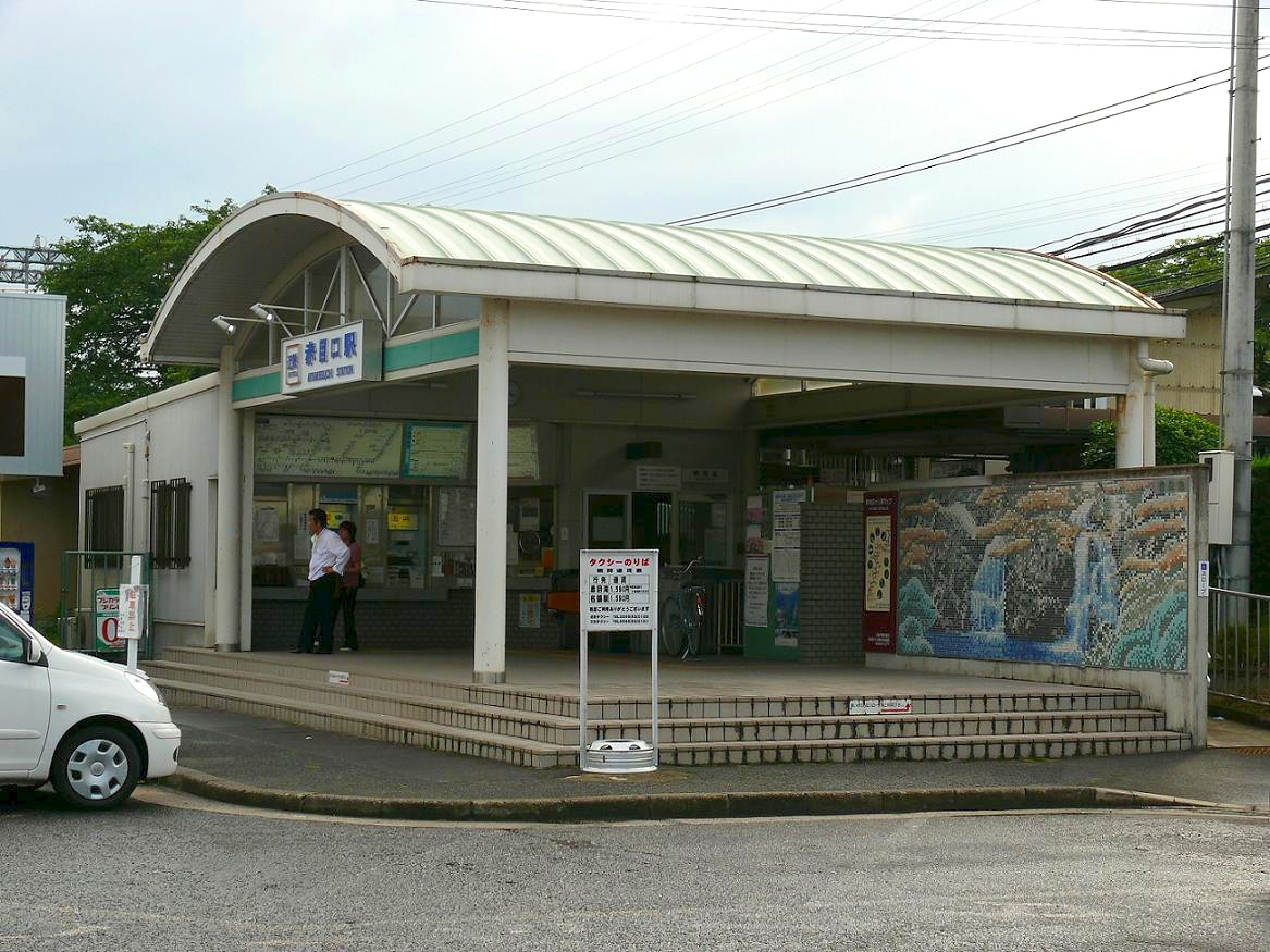 Kintetsu Railway Osaka line Akameguchi-Station(Japan). 近鉄大阪線赤目口駅の駅舎。 改札口脇には最寄の観光地である赤目四十八滝を描いた壁画がある。